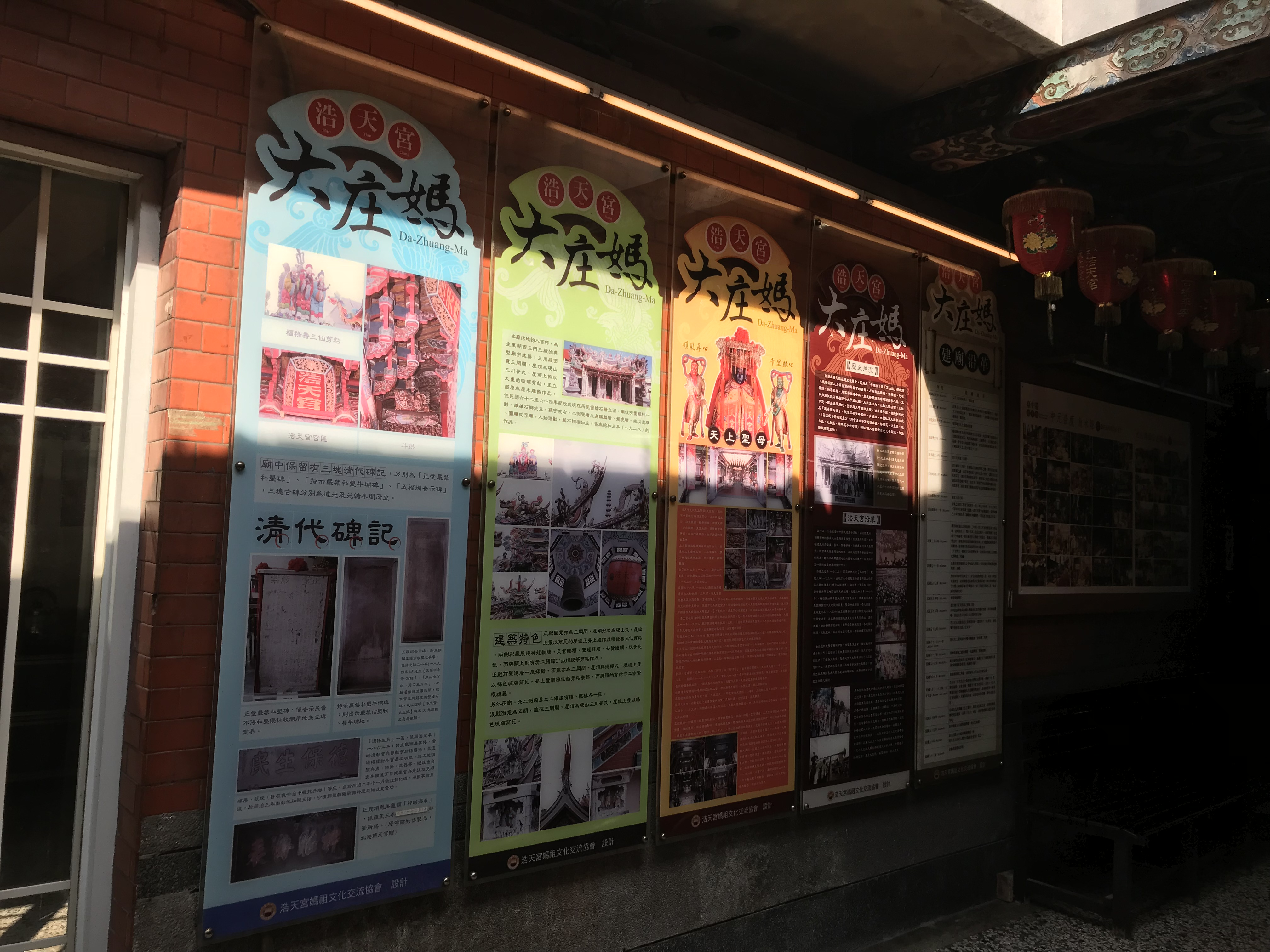 中文（台灣）: 大庄浩天宮清代碑記等說明